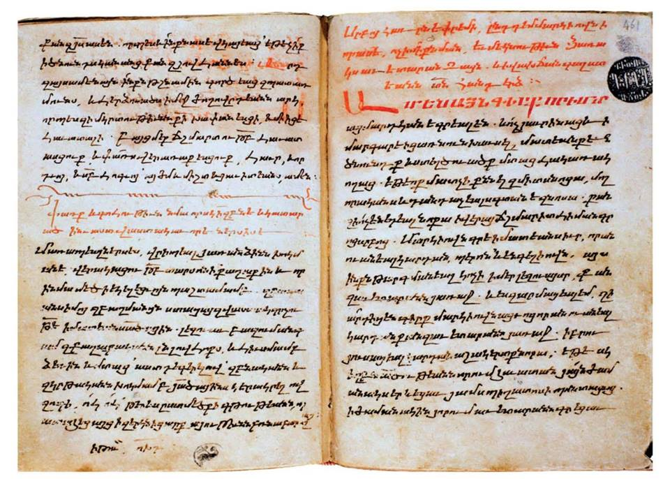 Памятная запись Нерсеса Ламбронаци 1195 года. Библиотека мхитаристов Св. Лазаря, рук No. 1551